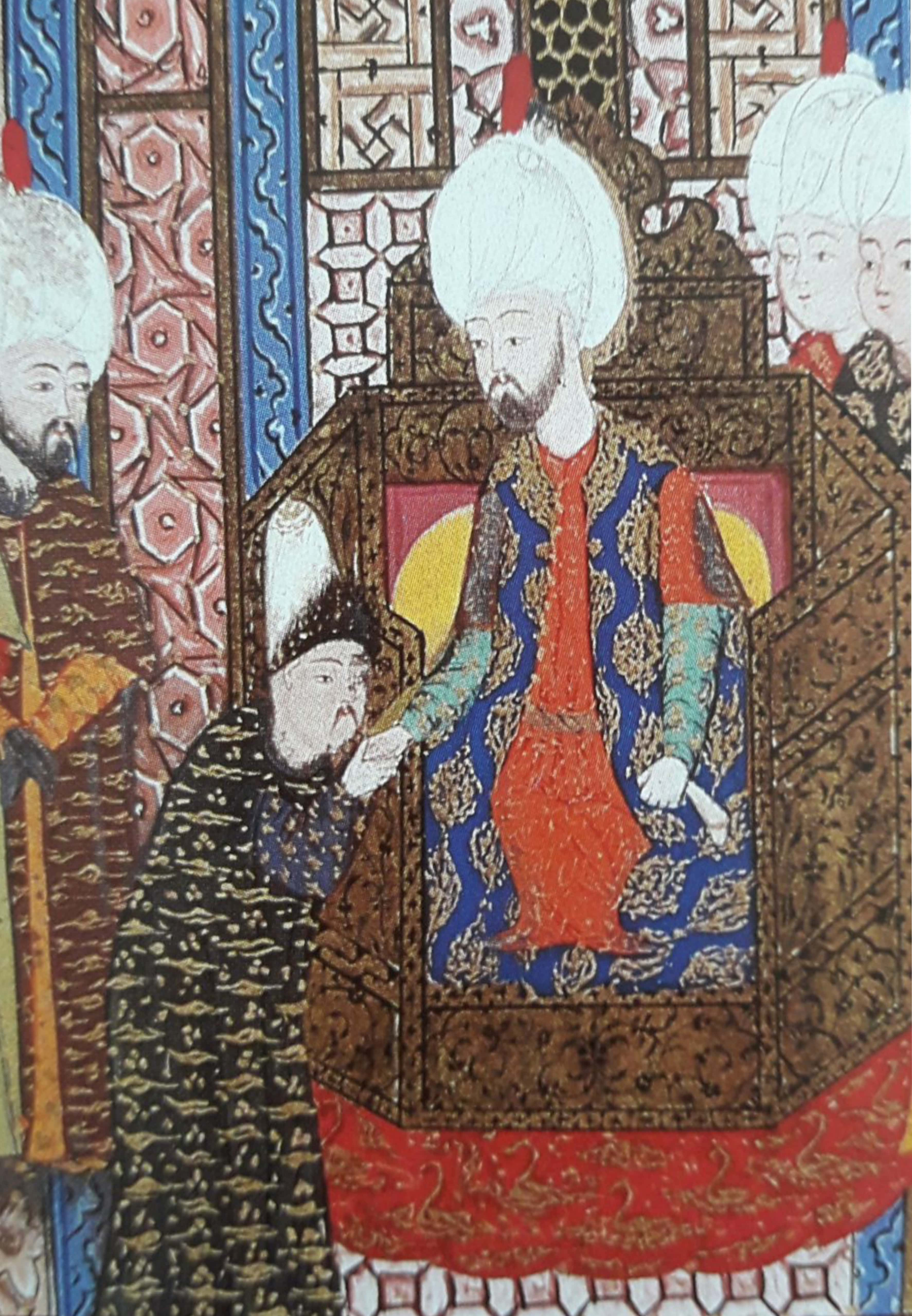 Девлет I Герай и Сулейман I Великолепный в 1551. Из Сулейман-наме. Известно, что в турецких источниках, как и на турецких миниатюрах, турки, стремясь показать свое господствующее положение в мусульманском мире, изображая или описывая крымских татар, всячески принижали их. Что заметно на этой миниатюре, где крымский хан даже визуально изображен в два раза меньше, чем Сулейман. Хотя в тюркской титулатуре титул хан выше, чем султан (так, в Крымском ханстве титул калги-султана носили наследники престола). А сам род Гераев как ответвление рода Чингизидов являлся и, что важно, признавался более знатным, чем род Османов. Об этом пишет, в частности, российский востоковед, академик РАН И. В. Зайцев.